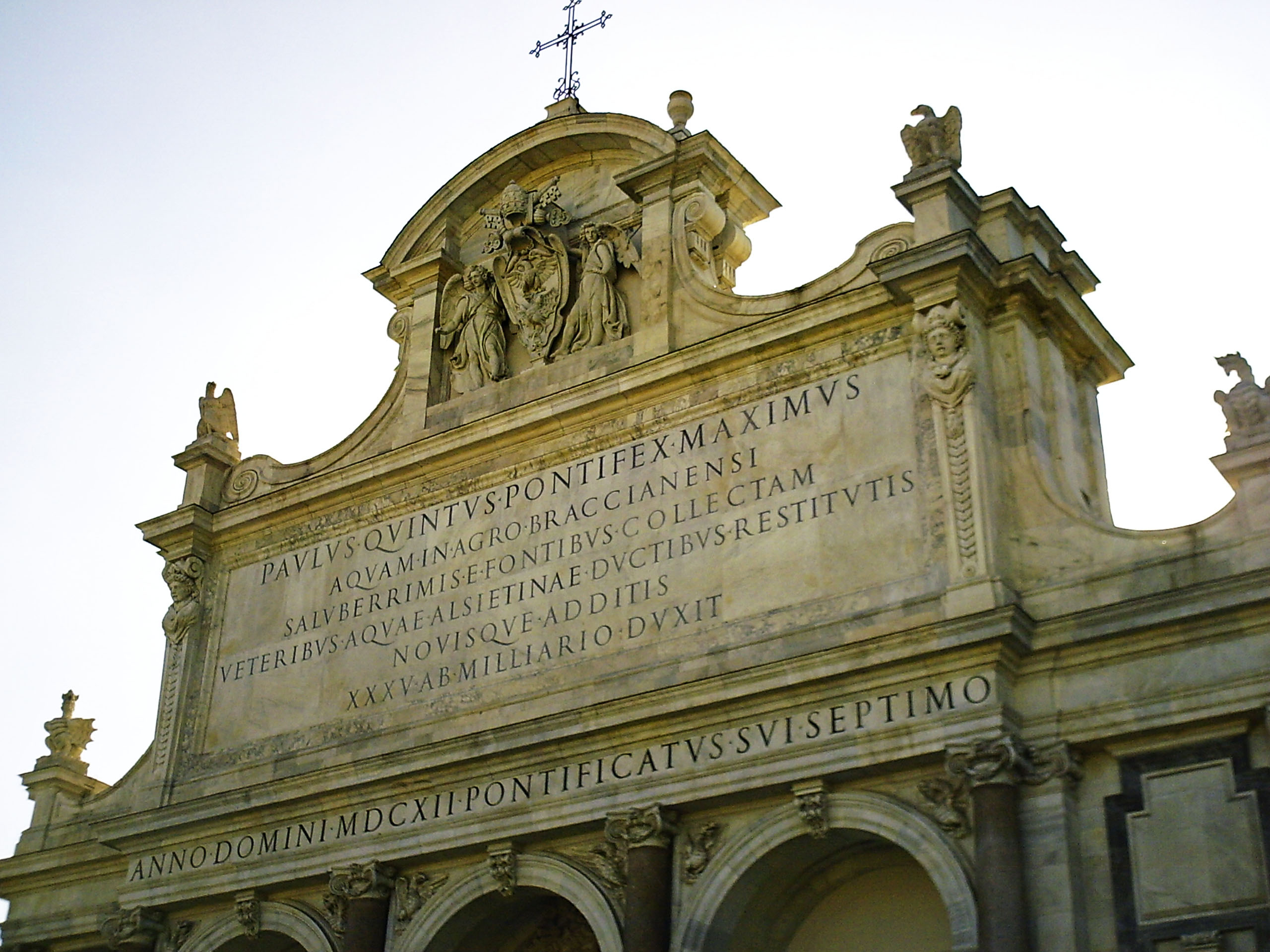 Inschrift der Fontanone dell'Acqua Paola auf dem Gianicolo in Rom.